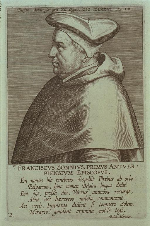 Der erste (katholische) Bischof von Antwerpen (1506-1576), Kupferstich